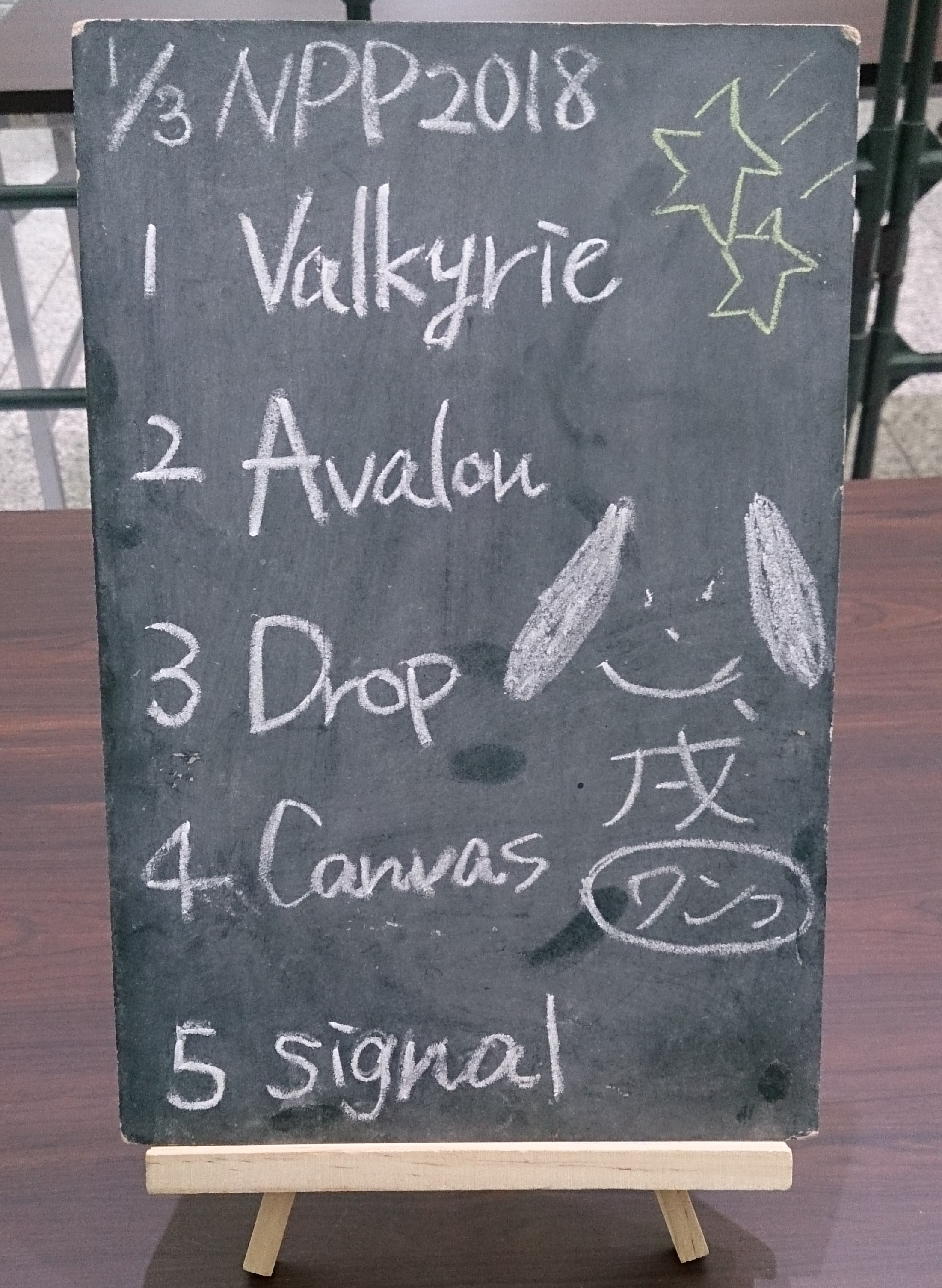 amiinAセトリボード(20180103(1))